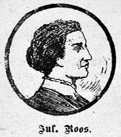 Julie Roos (1843–1896), Mordopfer, München, 1896, Tochter von Karoline Roos geb. Alwens